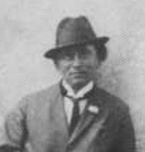 Perlrott-Csaba Vilmos magyar festő, grafikus.